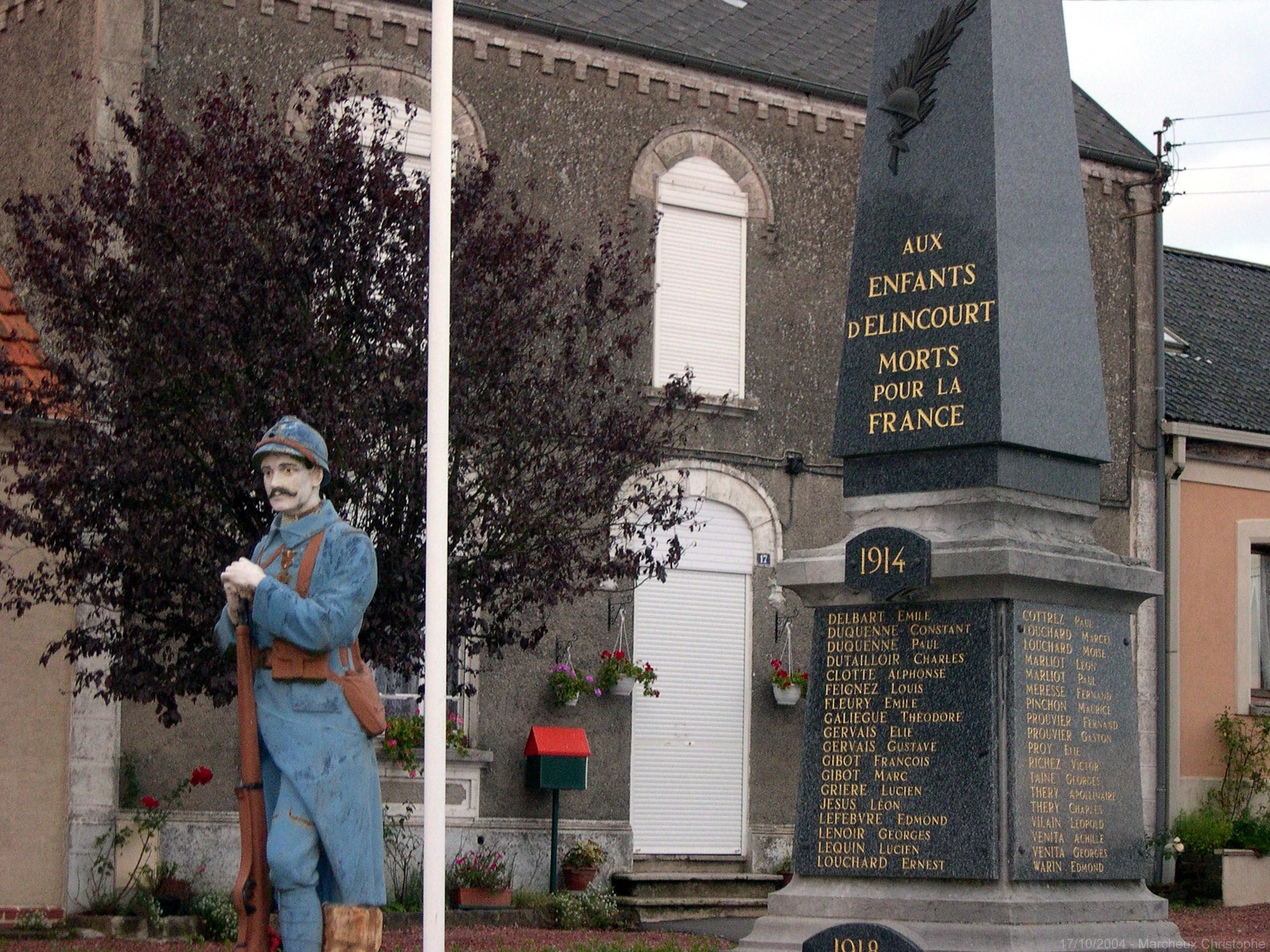 Photographie personnelle, libre de tous droits.